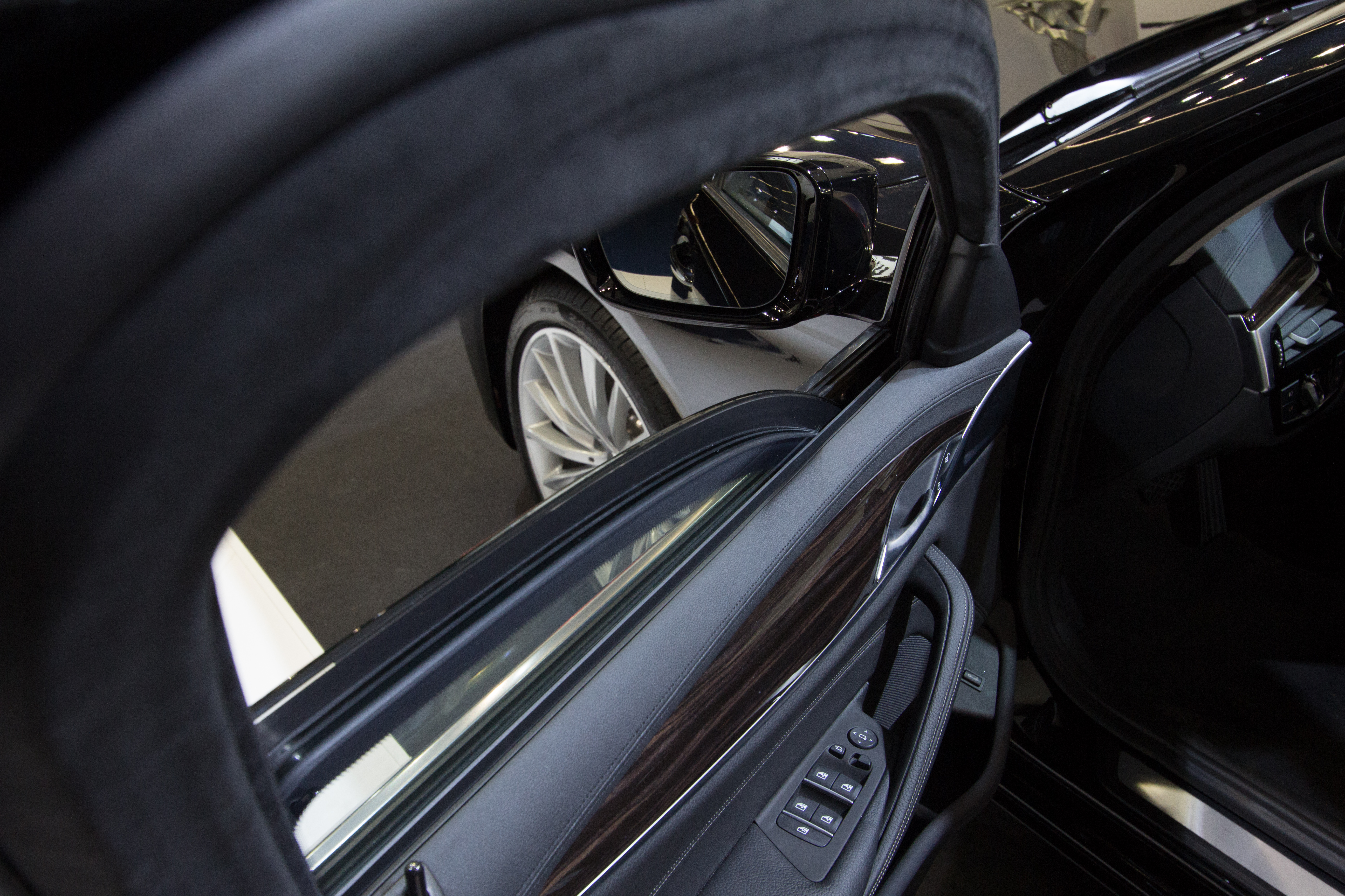 TRASCO auf der IAA 2017 in Frankfurt